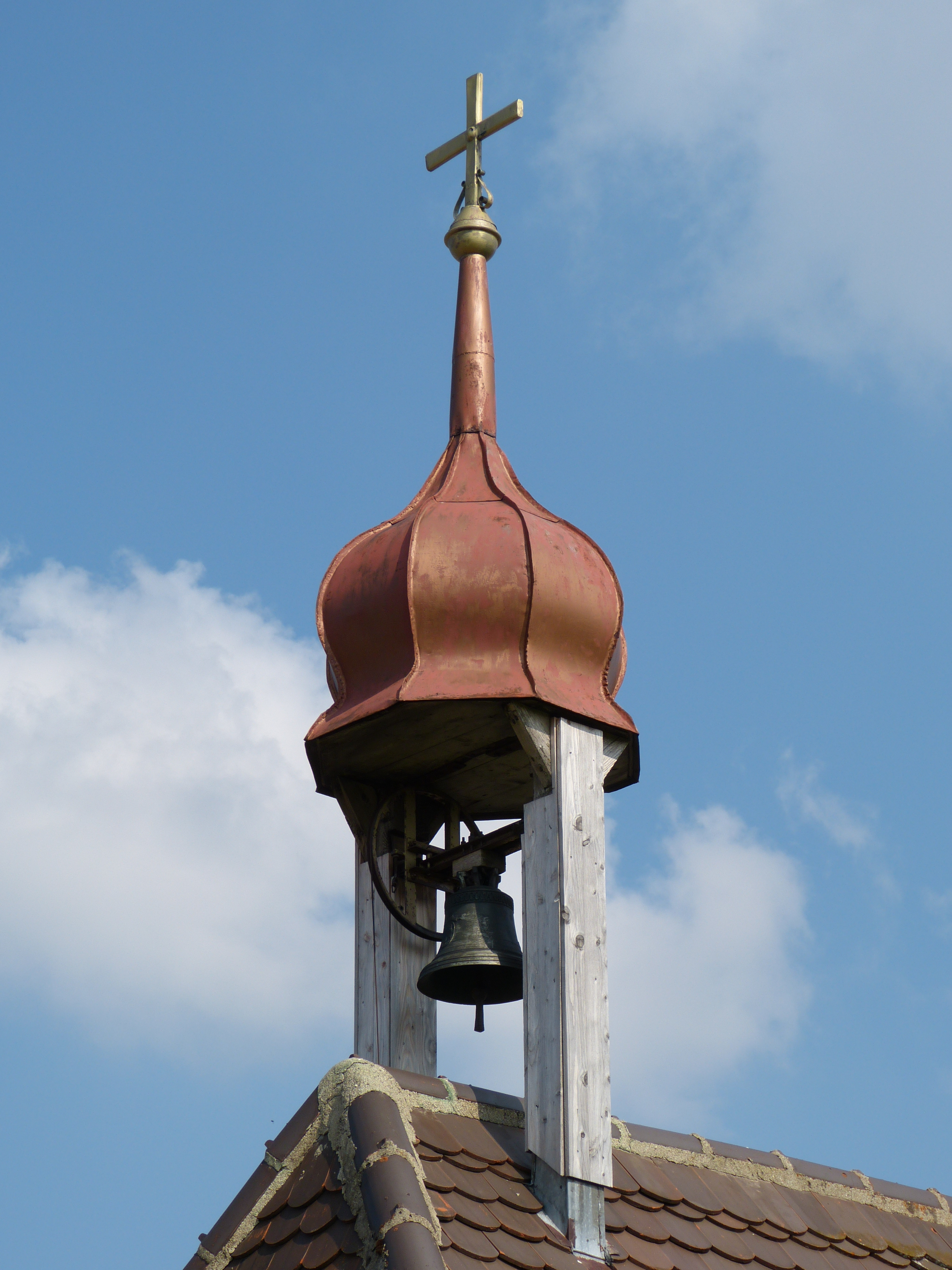 St. Maria, Dilpersried, Gemeinde Lautrach, Landkreis Unterallgäu, Bayern